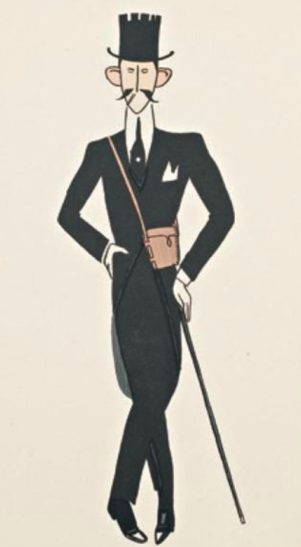 SEM - Jean Stern